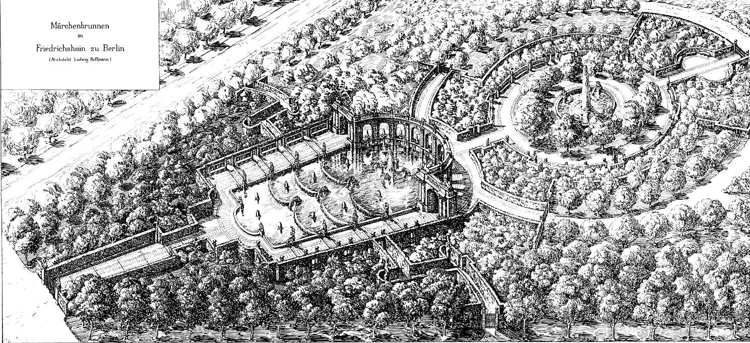 Märchenbrunnen im Berliner Volkspark Friedrichshain. Perspektivische Darstellung der Gesamtanlage.